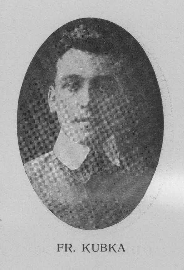 František Kubka (1894 - 1969), Český novinář, prozaik, básník a germanista.